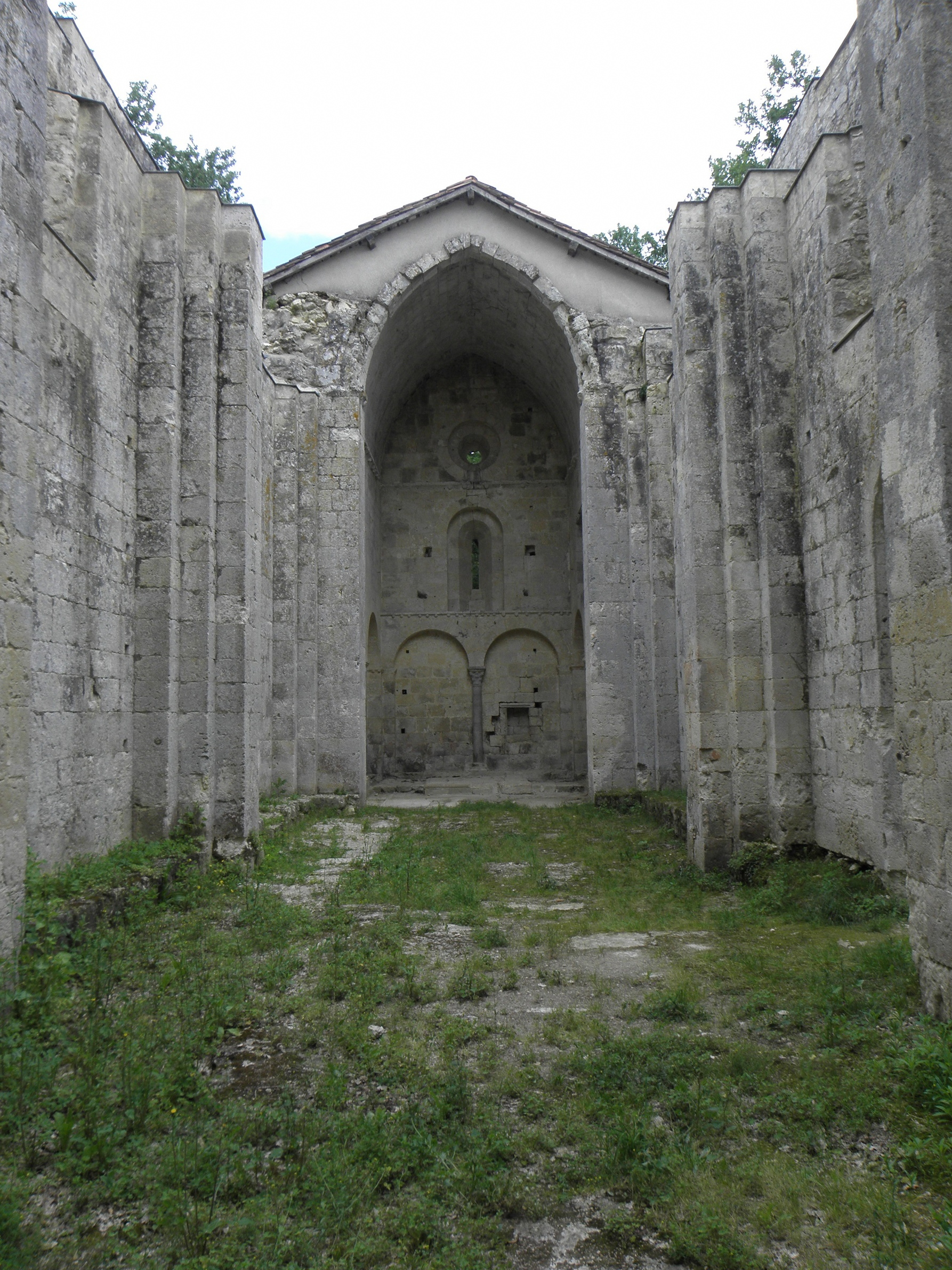 Église Saint-Pierre de Genens, sise commune de Montréal (32). Vue intérieure.